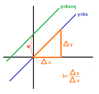 Smernicové vyjadrenie priamky